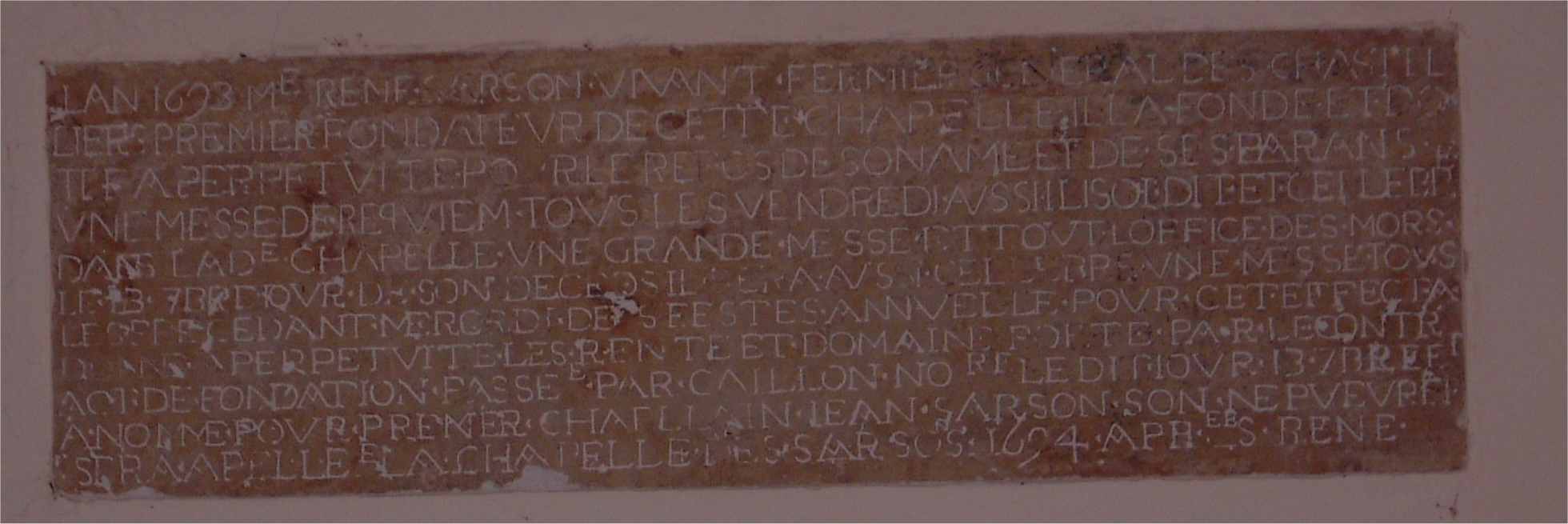 Plaque commémorative en pierre gravée dans l'église Saint-Maximin de Fomperron ( 79 ). Elle commémore la fondation de l'église par René Sarson.